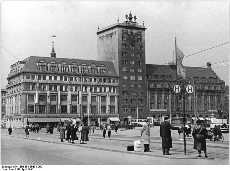 Leipzig, Karl-Marx-Platz Zentralbild Illner 28.4.1955 Von der Internationalen Friedensfahrt Prag - Berlin - Warschau Städte und Gemeinden in der DDR, durch welche die Radfernfahrt geht Der Karl-Marx-Platz in Leipzig. Hier kommen die Fahrer vorbei, wenn sie aus Karl-Marx-Stadt eintreffen. Auf diesem Platz ist auch der Ehrenstart für die Etappe nach Berlin.